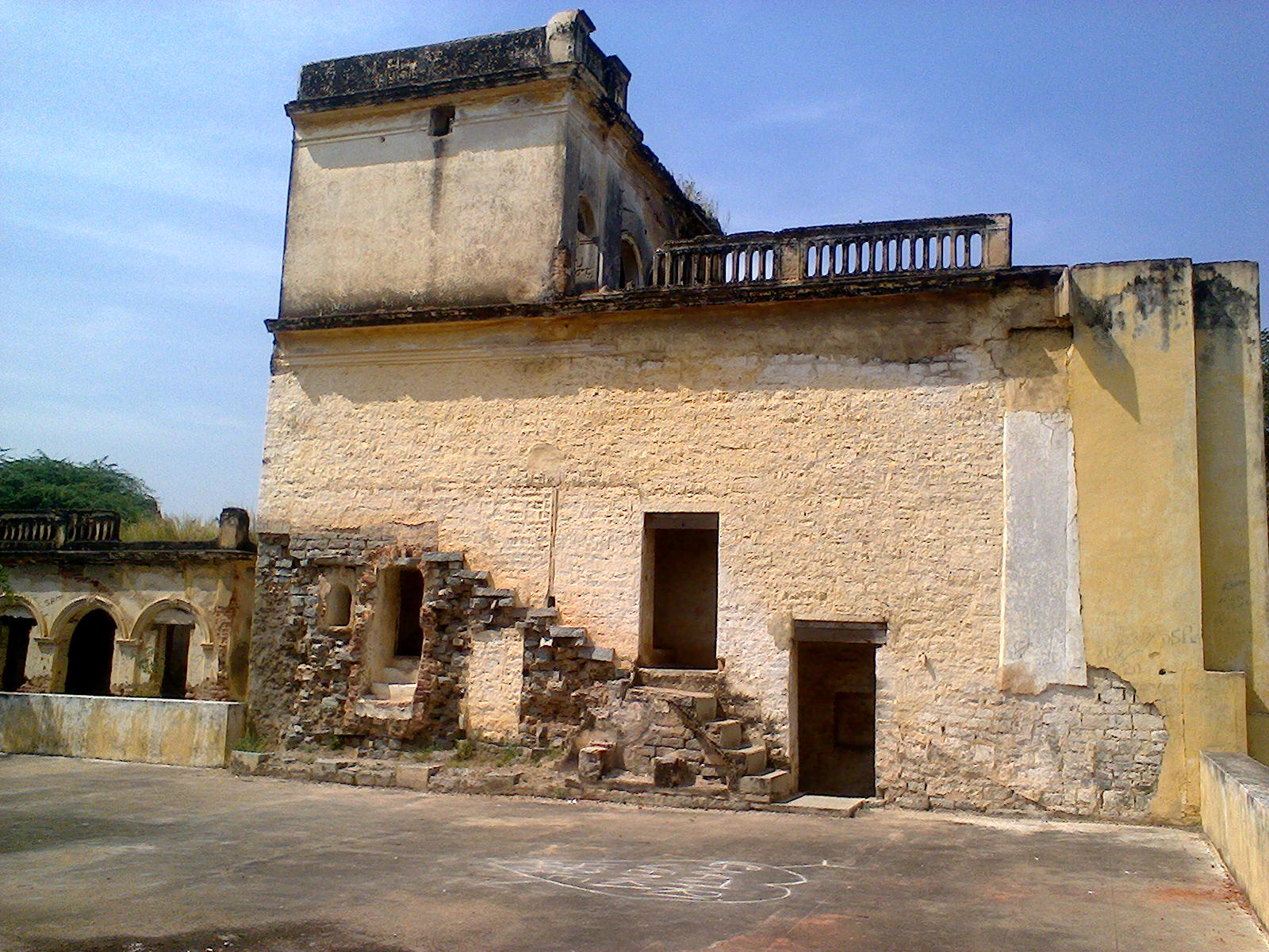 రాజా వారి శిథిల భవనం